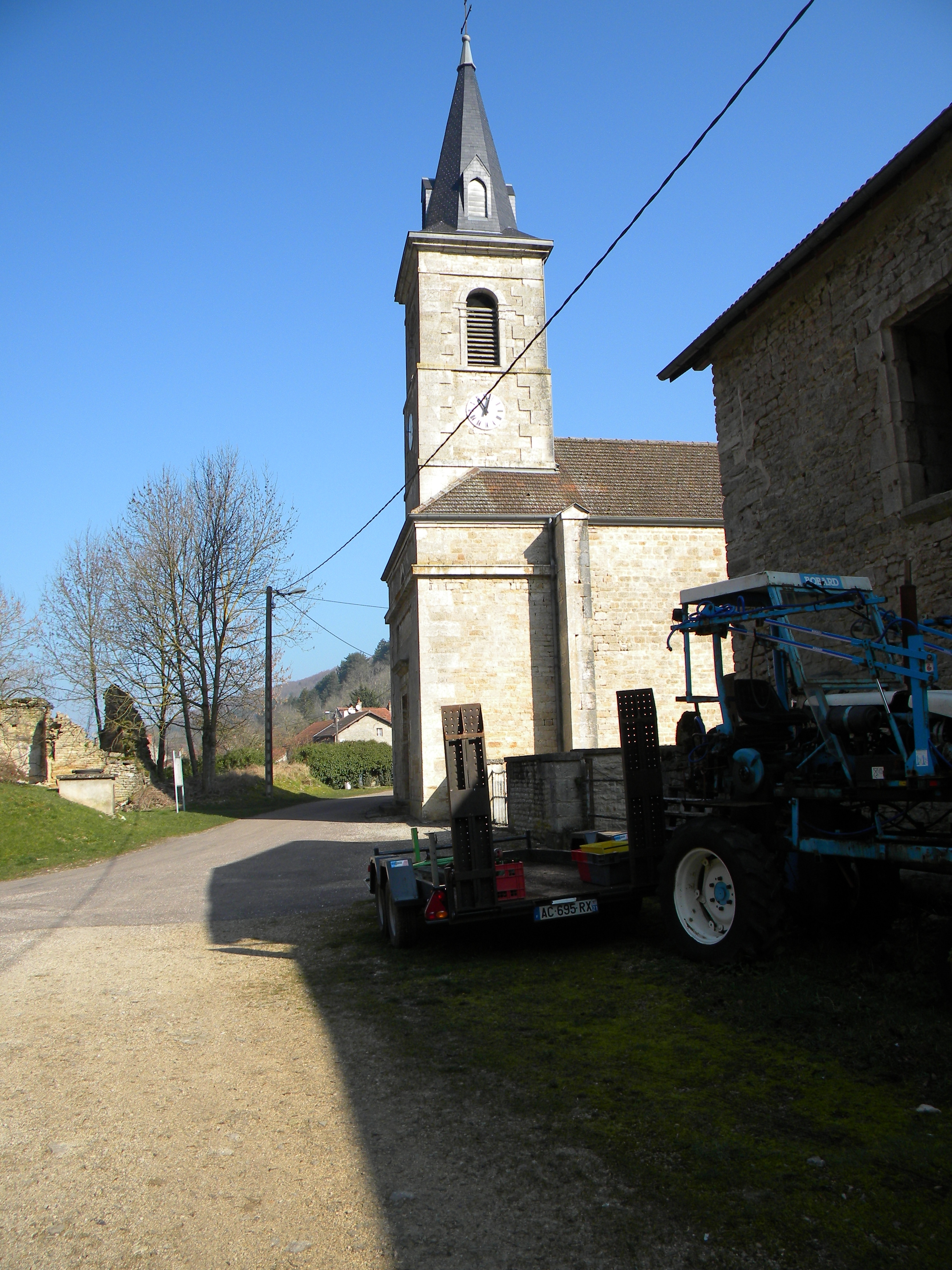 Kirko Sankta Antide